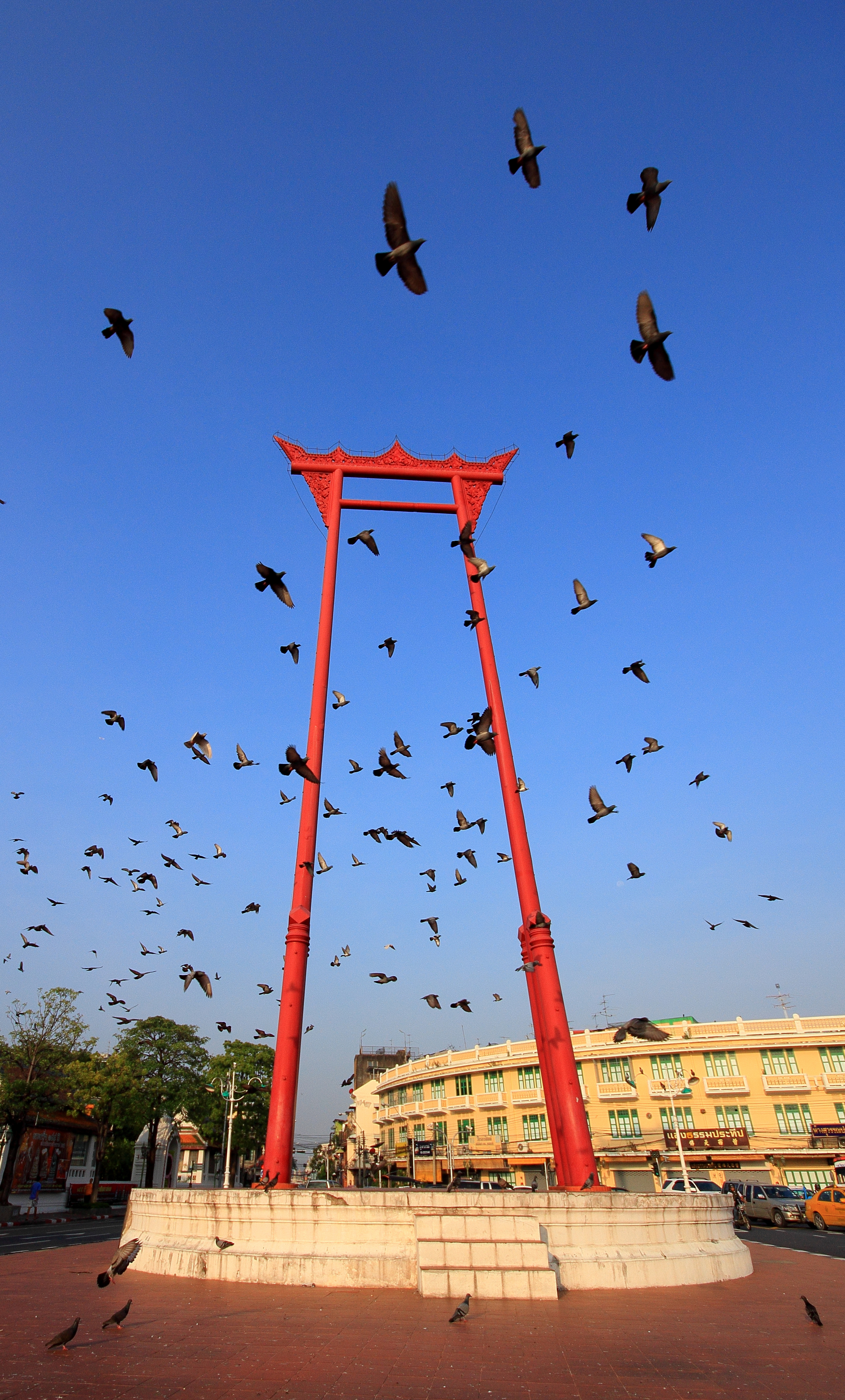 เสาชิงช้า เป็นสถาปัตยกรรมที่สร้างขึ้นเพื่อใช้ประกอบพิธีโล้ชิงช้า ในพระราชพิธีตรียัมพวาย ตรีปวายของศาสนาพราหมณ์-ฮินดู โดยทั่วไปหมายถึงเสาชิงช้าที่ตั้งอยู่หน้าวัดสุทัศน์เทพวราราม และลานหน้าศาลาว่าการกรุงเทพมหานคร (ลานคนเมือง) ใกล้กับเทวสถานโบสถ์พราหมณ์ ในพื้นที่แขวงเสาชิงช้าและแขวงวัดราชบพิธ เขตพระนคร กรุงเทพมหานคร ซึ่งถือเป็นสัญลักษณ์อย่างหนึ่งของกรุงเทพมหานคร แม้พิธีโล้ชิงช้าได้เลิกไปแล้วตั้งแต่สมัยพระบาทสมเด็จพระปกเกล้าเจ้าอยู่หัว รัชกาลที่ 7